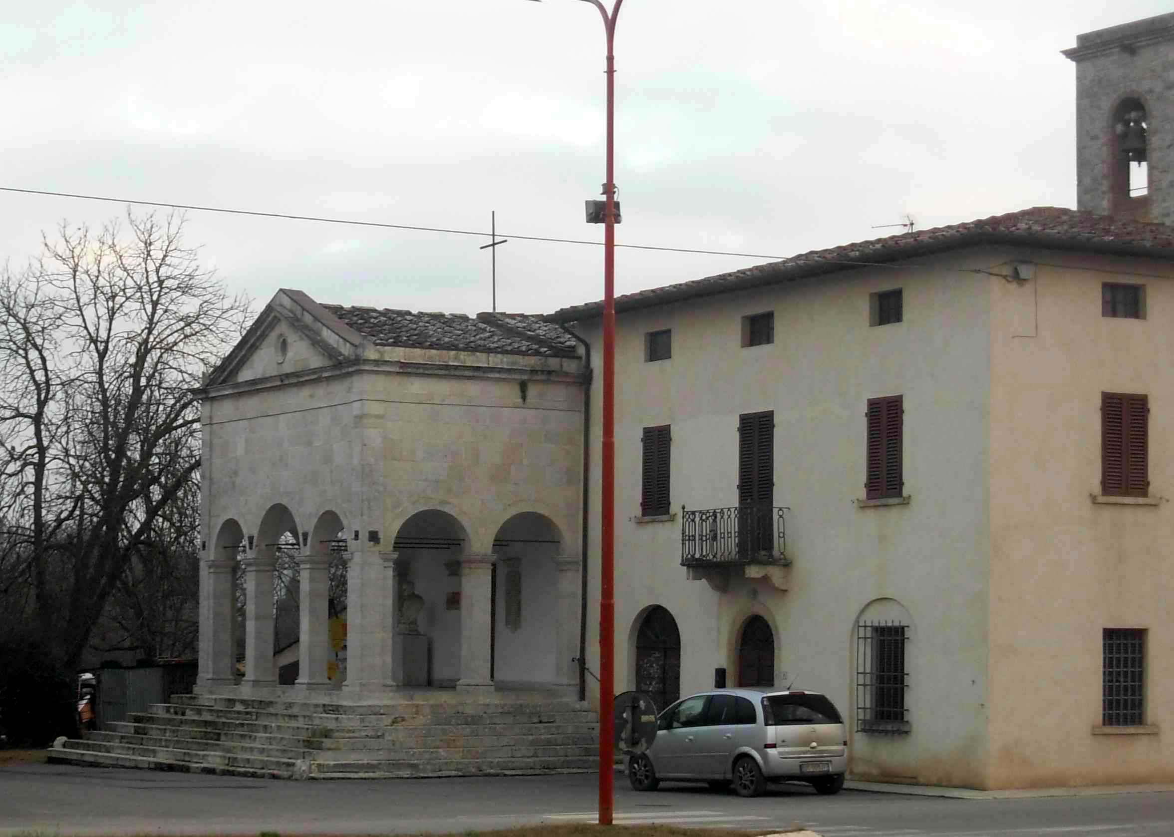 Colle di Val d'Elsa (Siena - Italia): La chiesa di San Marziale